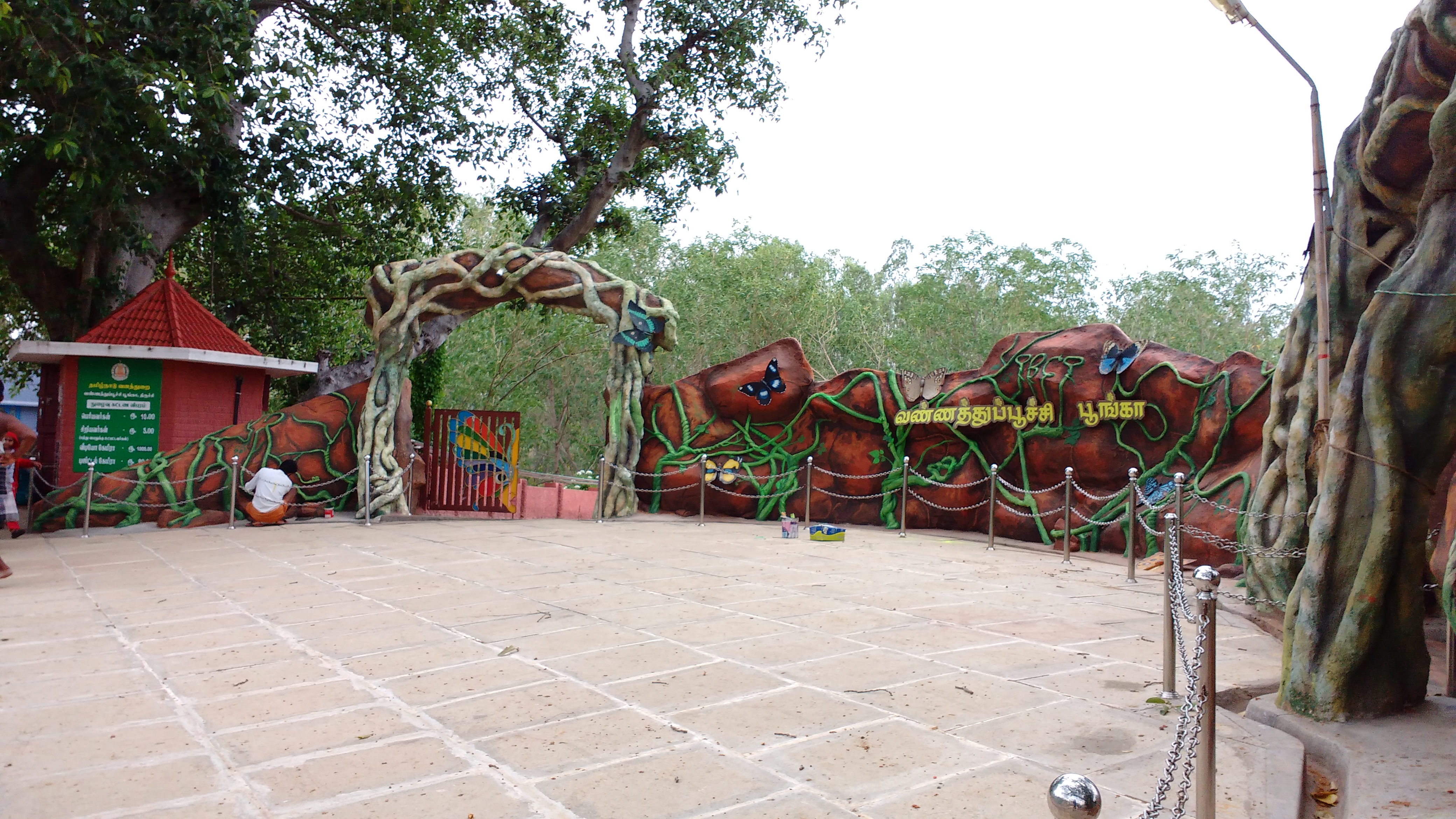 ஸ்ரீரங்கம் வண்ணத்துப்பூச்சி பூங்காவின் முகப்புத் தோற்றம்